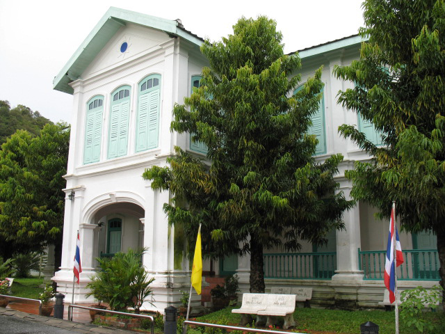 Kuden Mansion or Satun National Museum.